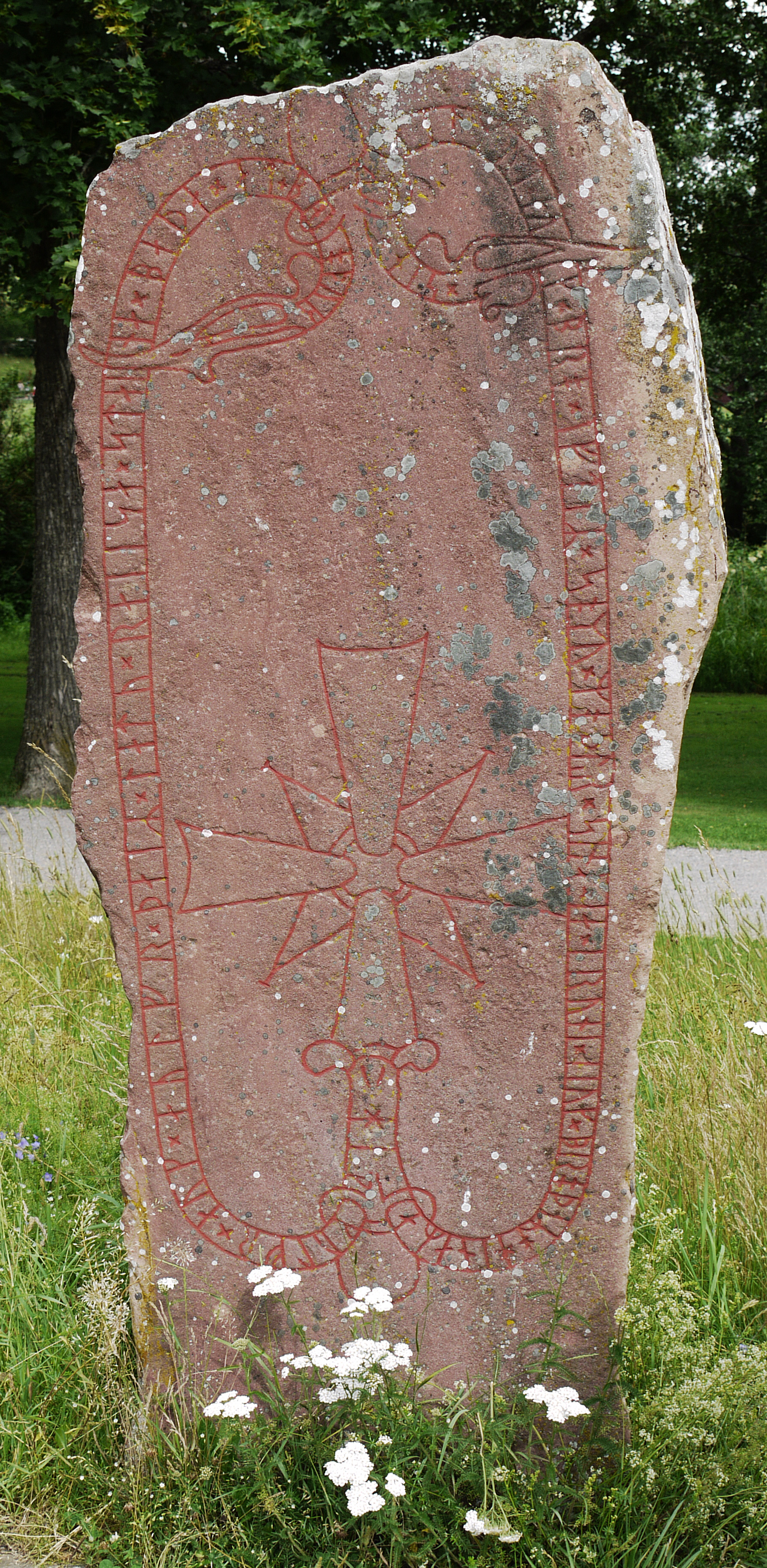 Runsten Sö 178, placerad intill Gripsholms slott, Mariefred.